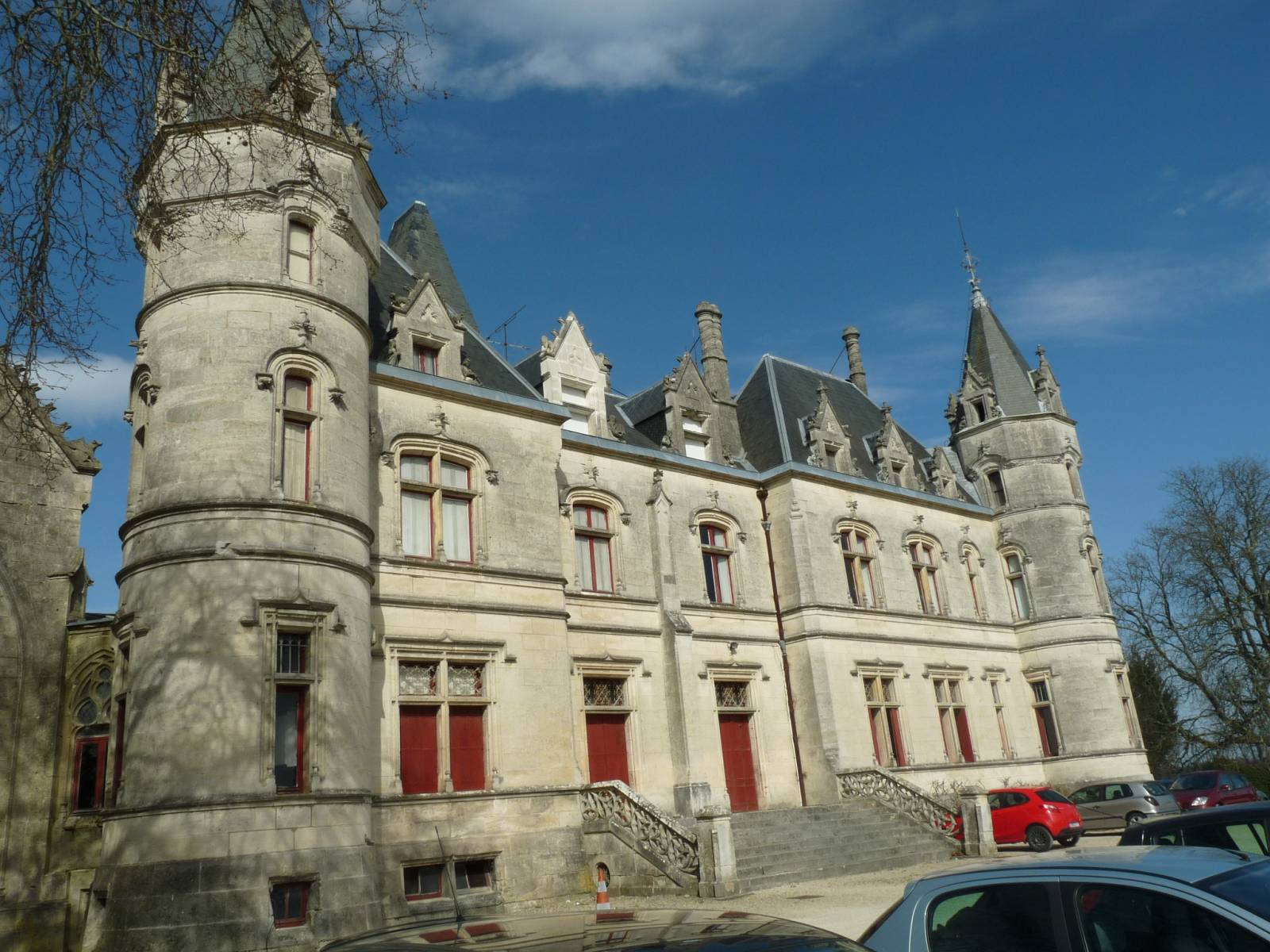 hôpital St-Bernard à Touvérac, Charente, France